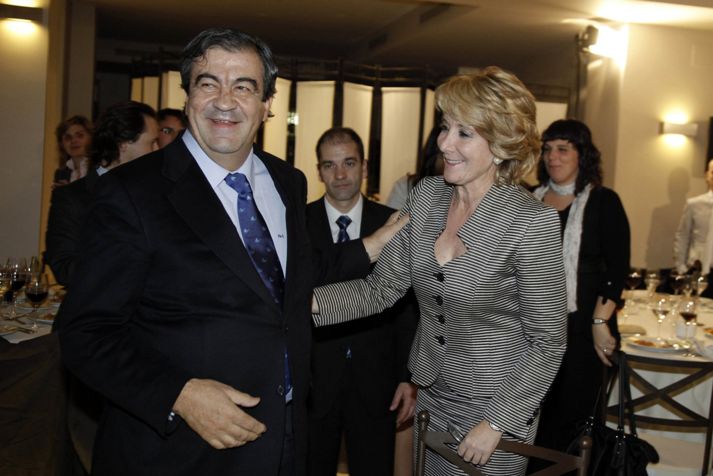 Álvarez- Cascos y Esperanza Aguirre en la cena de Navidad PP Collado- Villalba